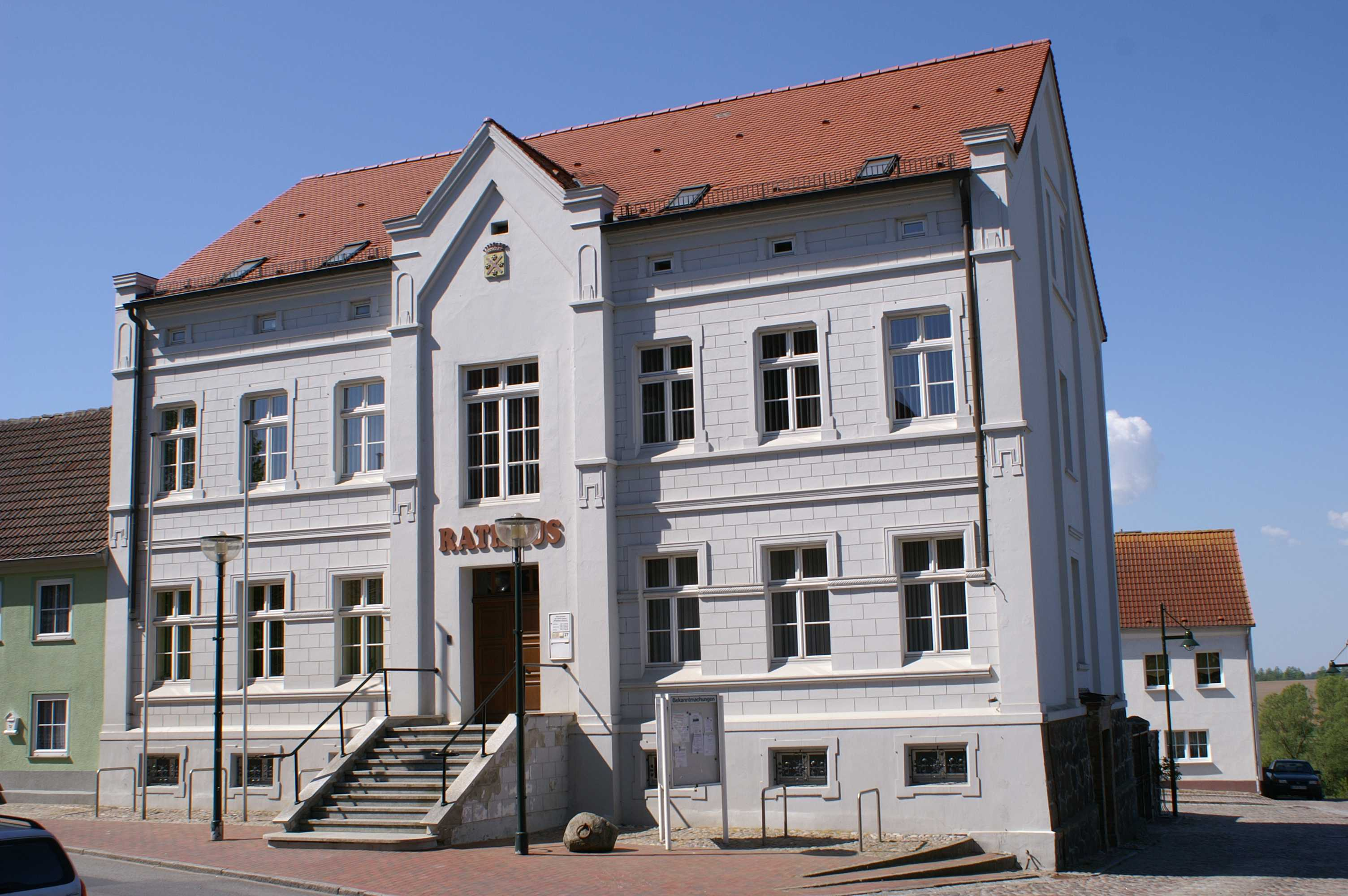 Rathaus von Gützkow (LK Ostvorpommern)